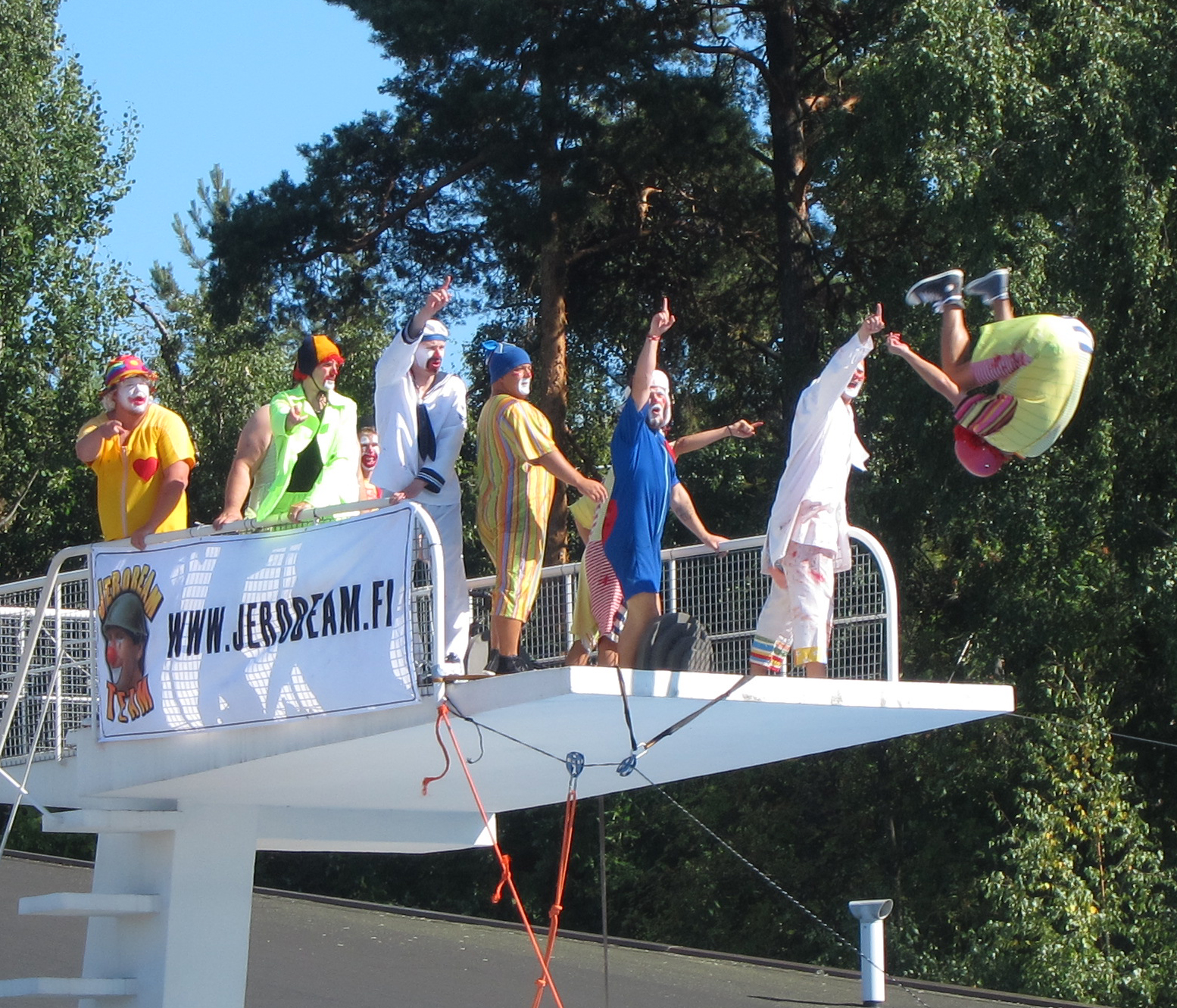 Suomalainen Jerobeam Salakyttä Team -pelleuimahyppyseurue esiintymässä Kotkan maauimalassa Kotkan meripäivillä 2013.